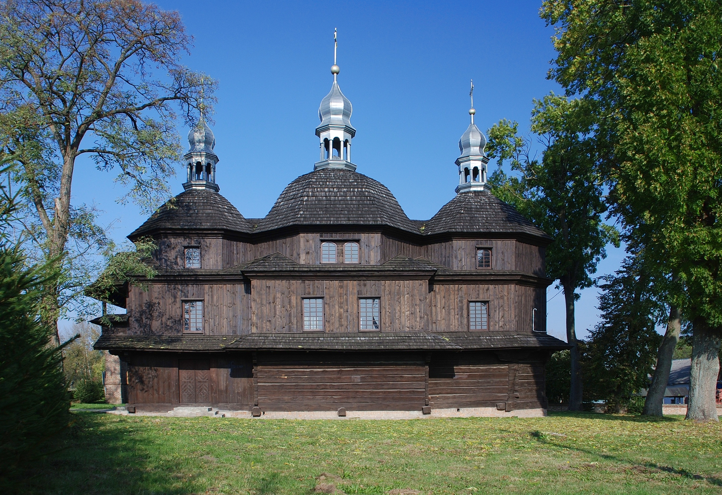 cerkiew